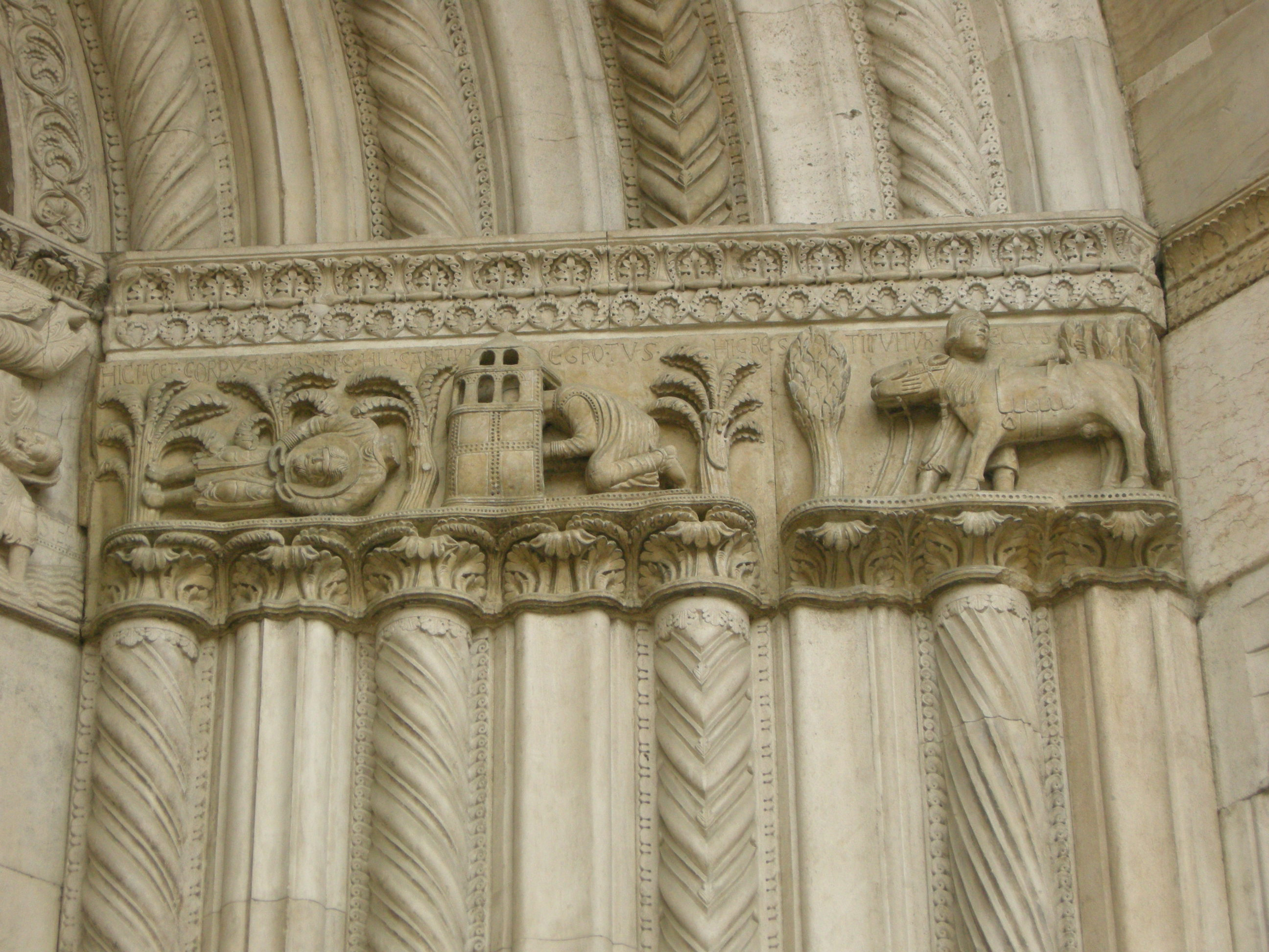 Duomo di fidenza, sculture del portale c.le, san donnino guarisce un ammalato e fa ritrovare un cavallo rubato